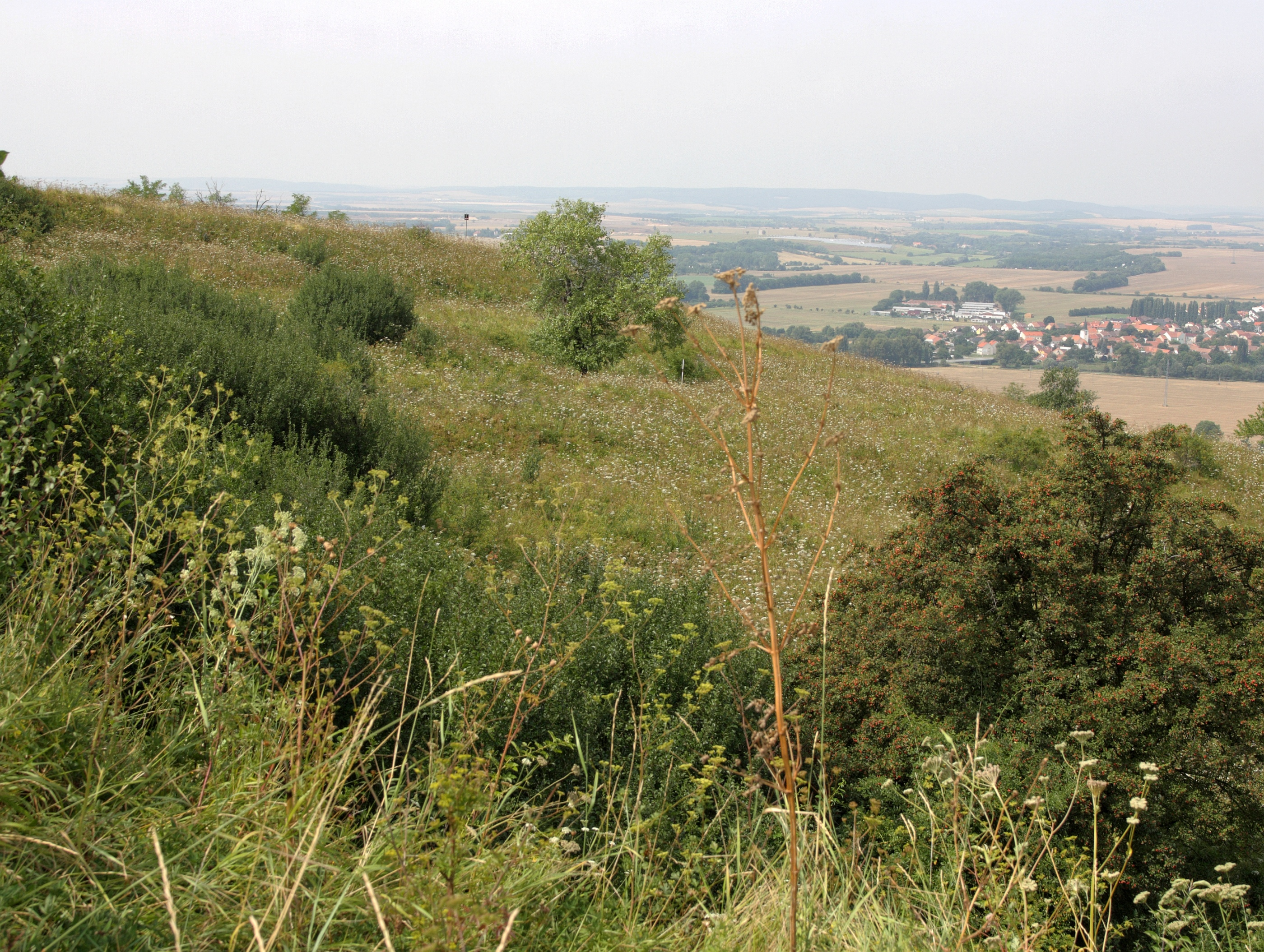 Přírodní památka Nové hory, okres Brno-venkov.